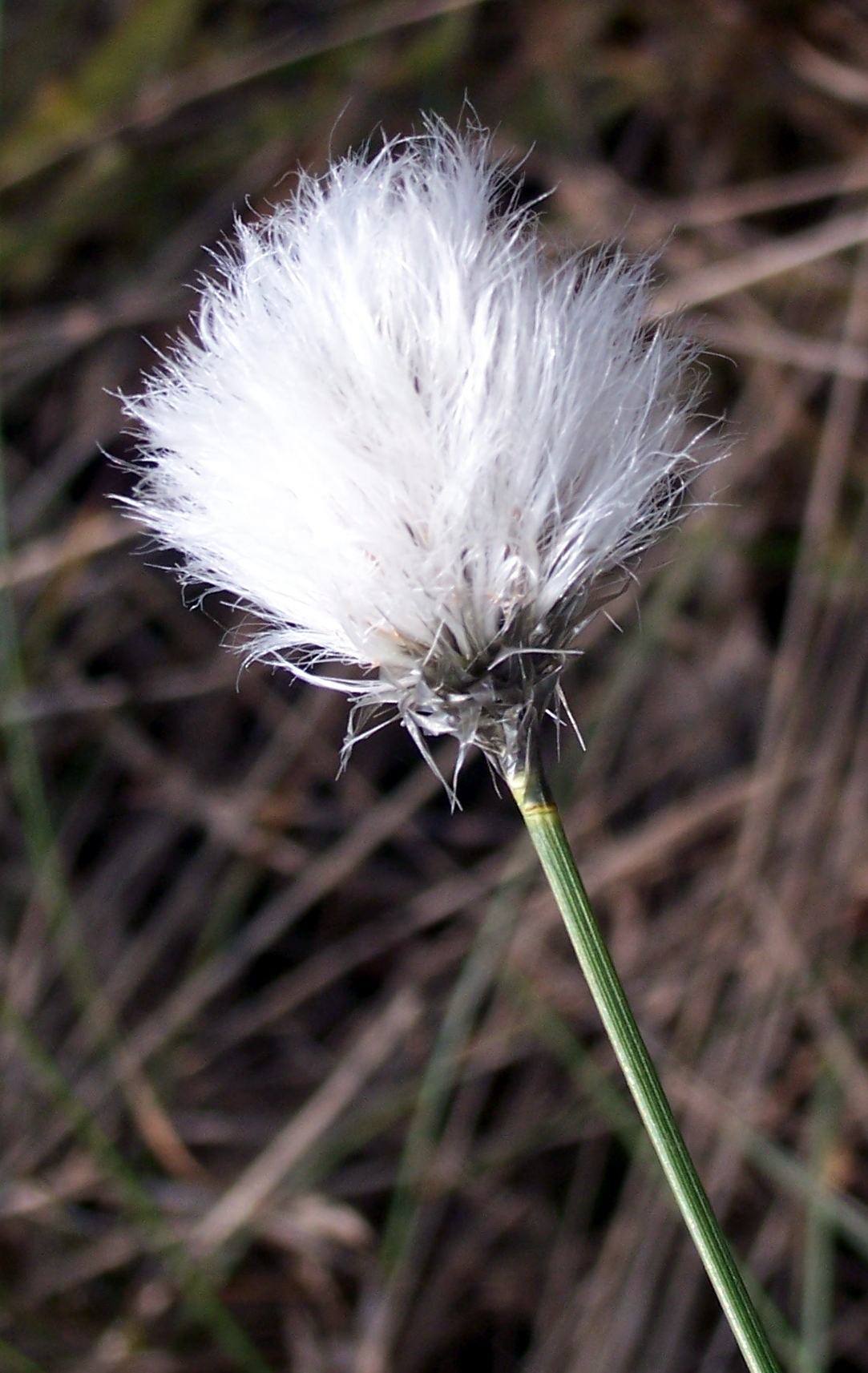 Fruchtendes Eriophorum vaginatum (Scheiden-Wollgras) im Dosenmoor Neumünster